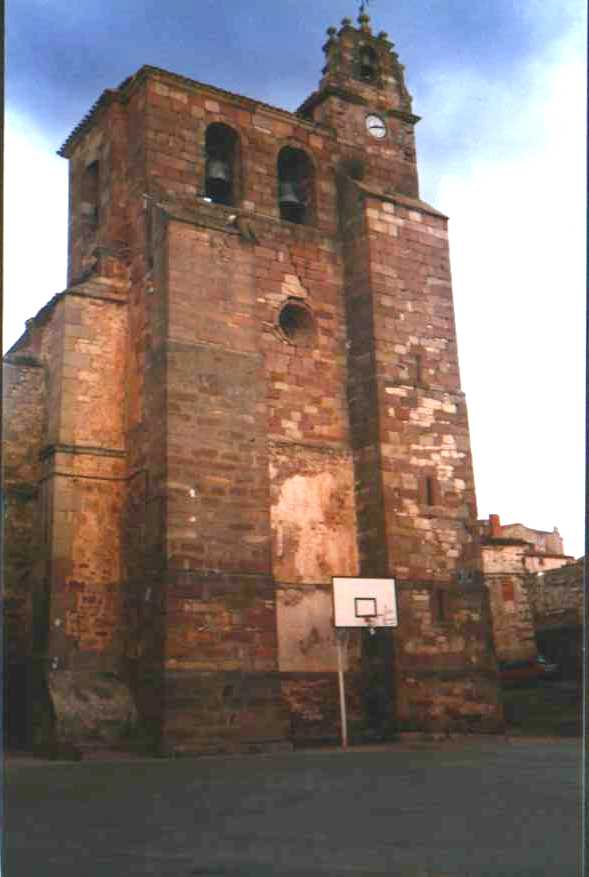 La Iglesia Principal de Luzón (Guadalajara)